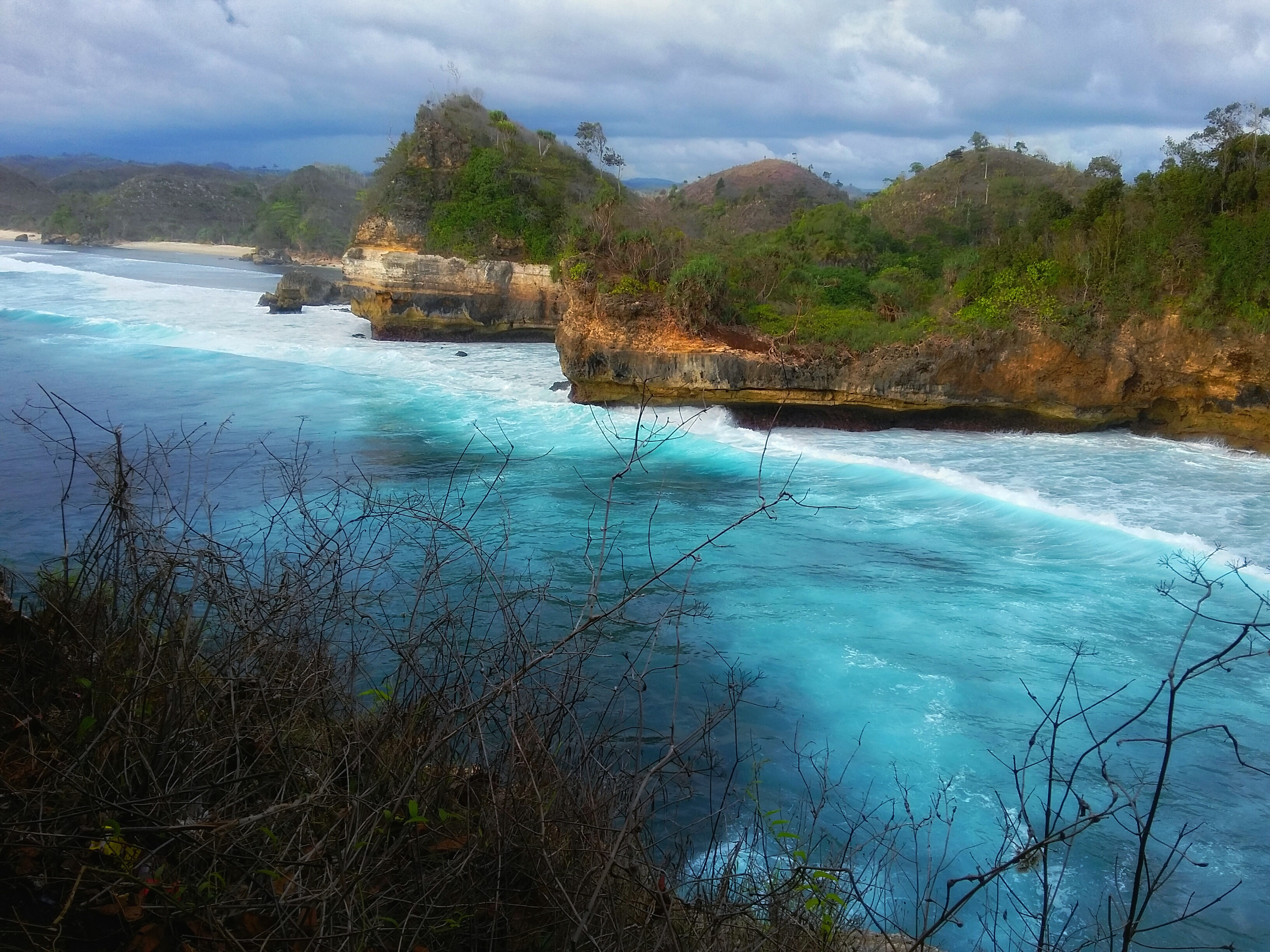 Terkagum ketika melihat ombak yang terus bersambutan